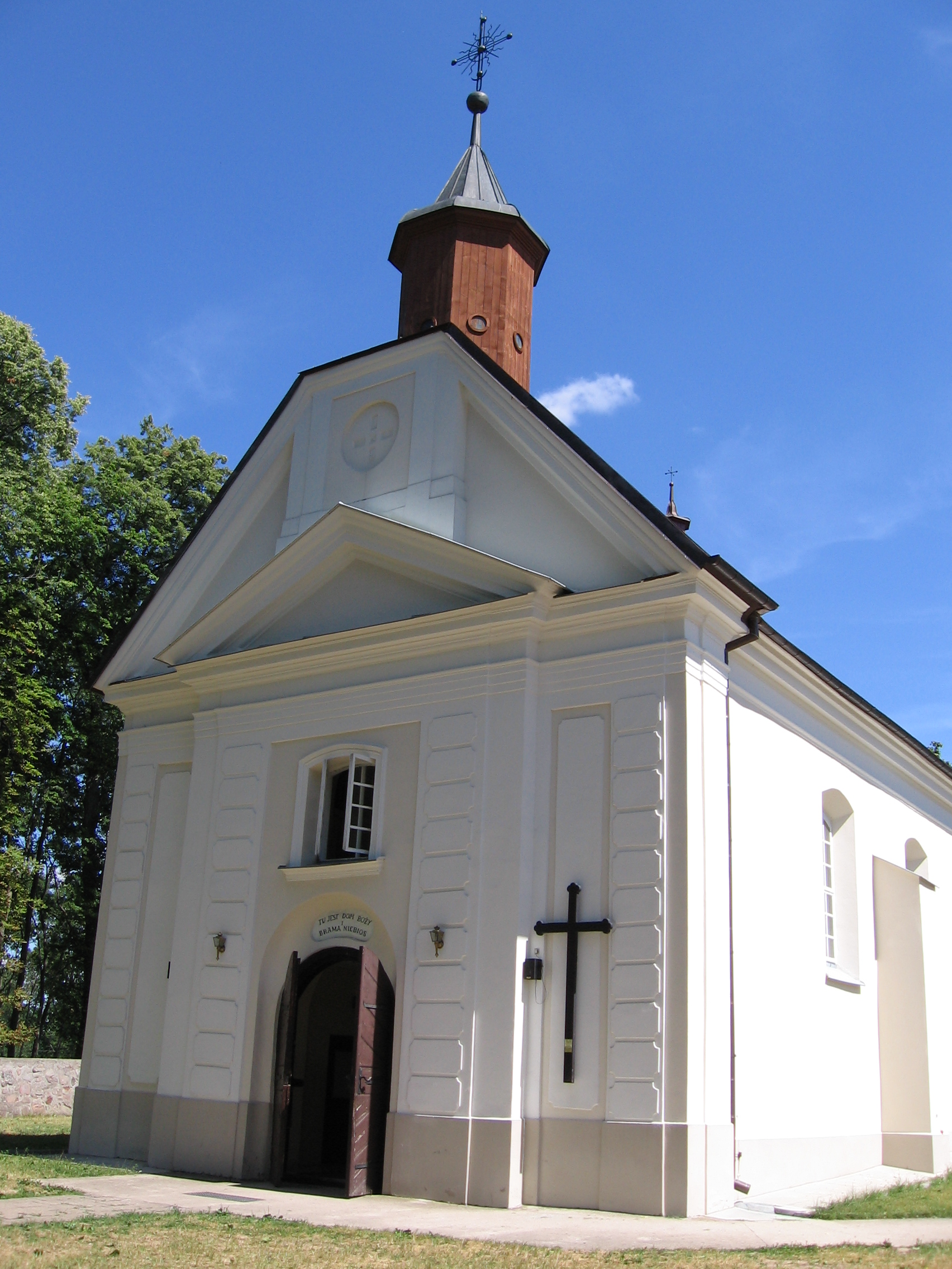 Strabla - kościół parafialny p.w. Wniebowstąpienia Pańskiego, mur., 1617, 1776 (zabytek nr 233 z 25.10.1966)